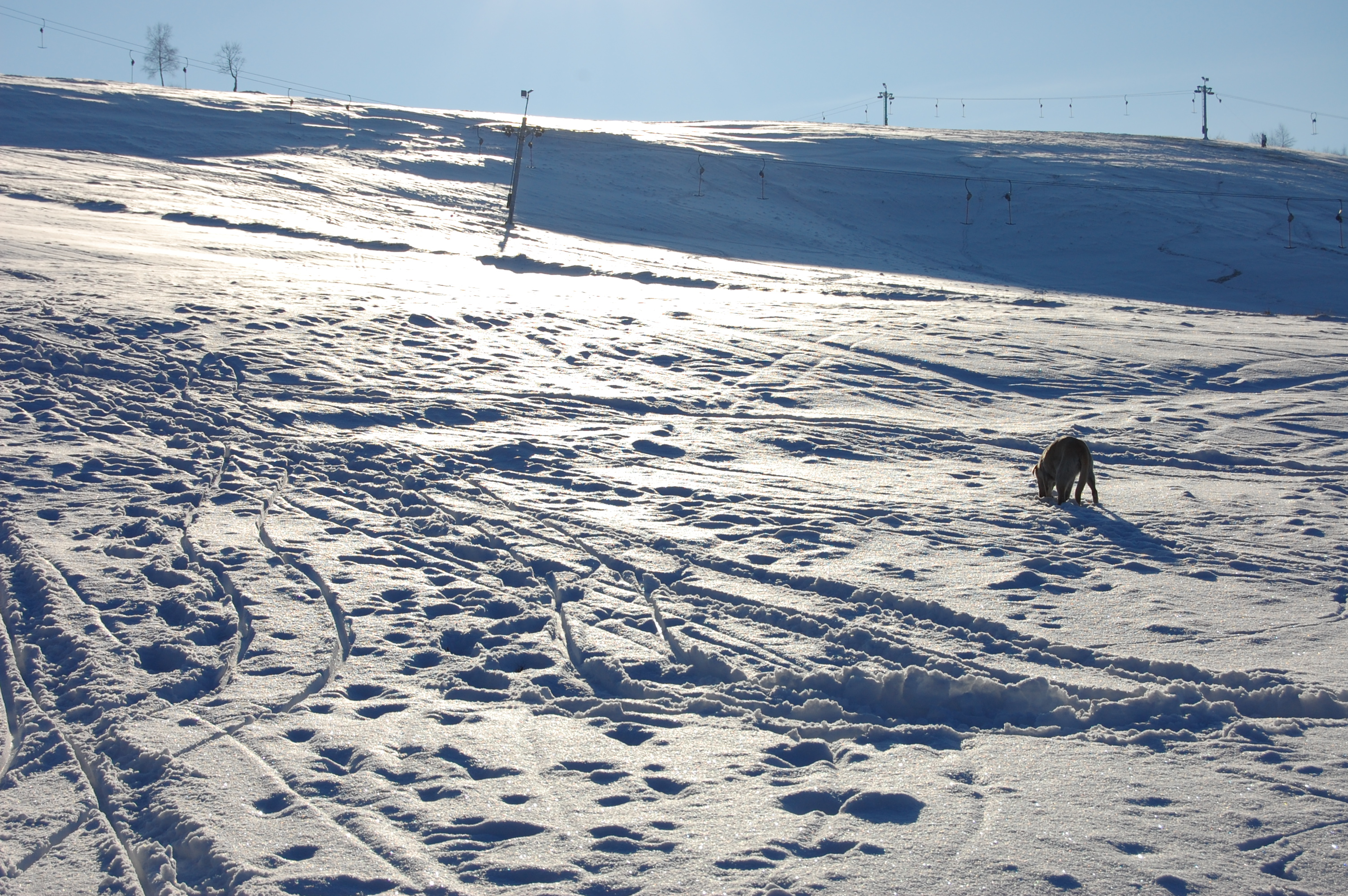 Skilift Rostovo